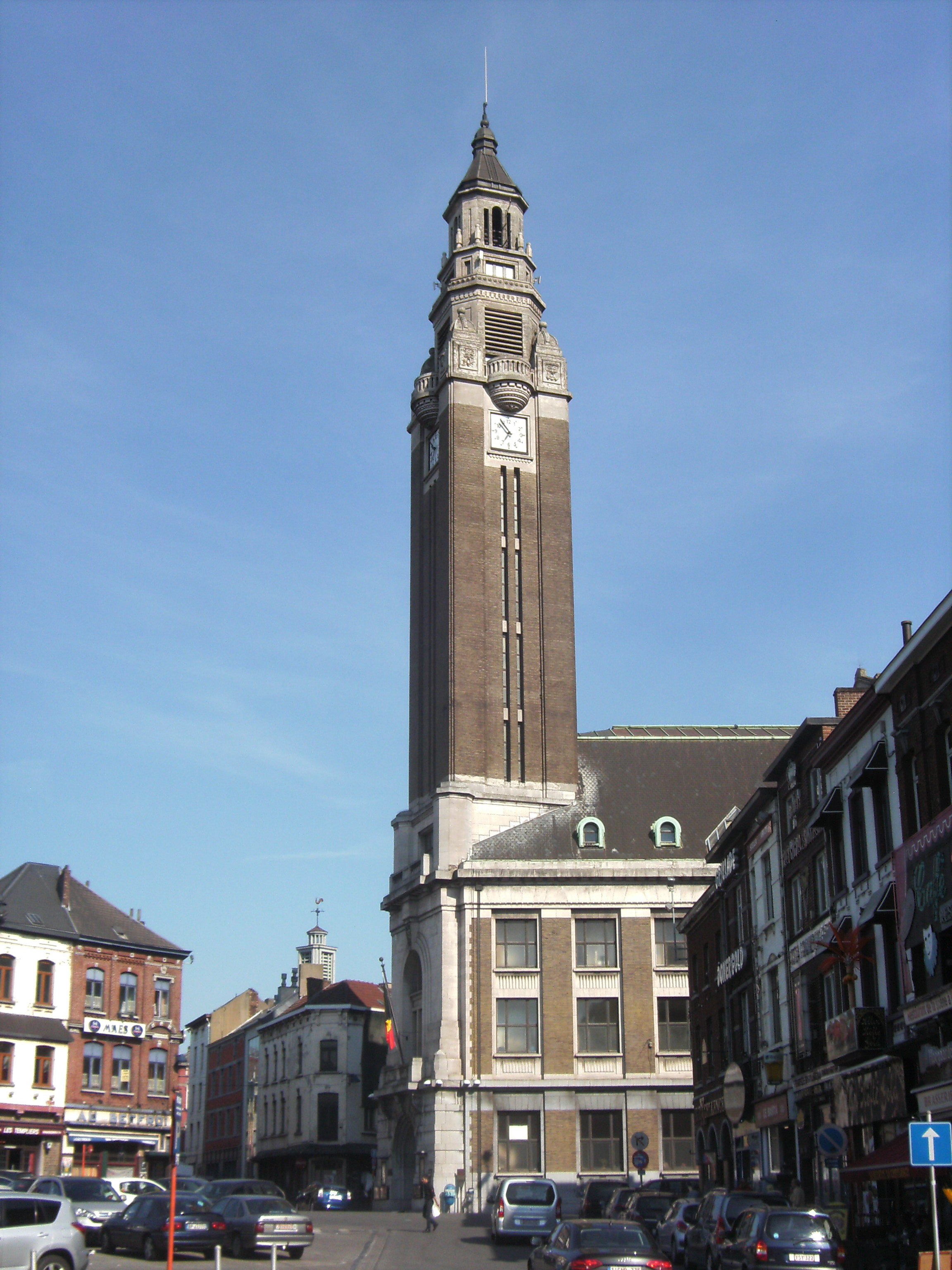 Charleroi (Belgique) - Beffroi de l'hôtel de ville